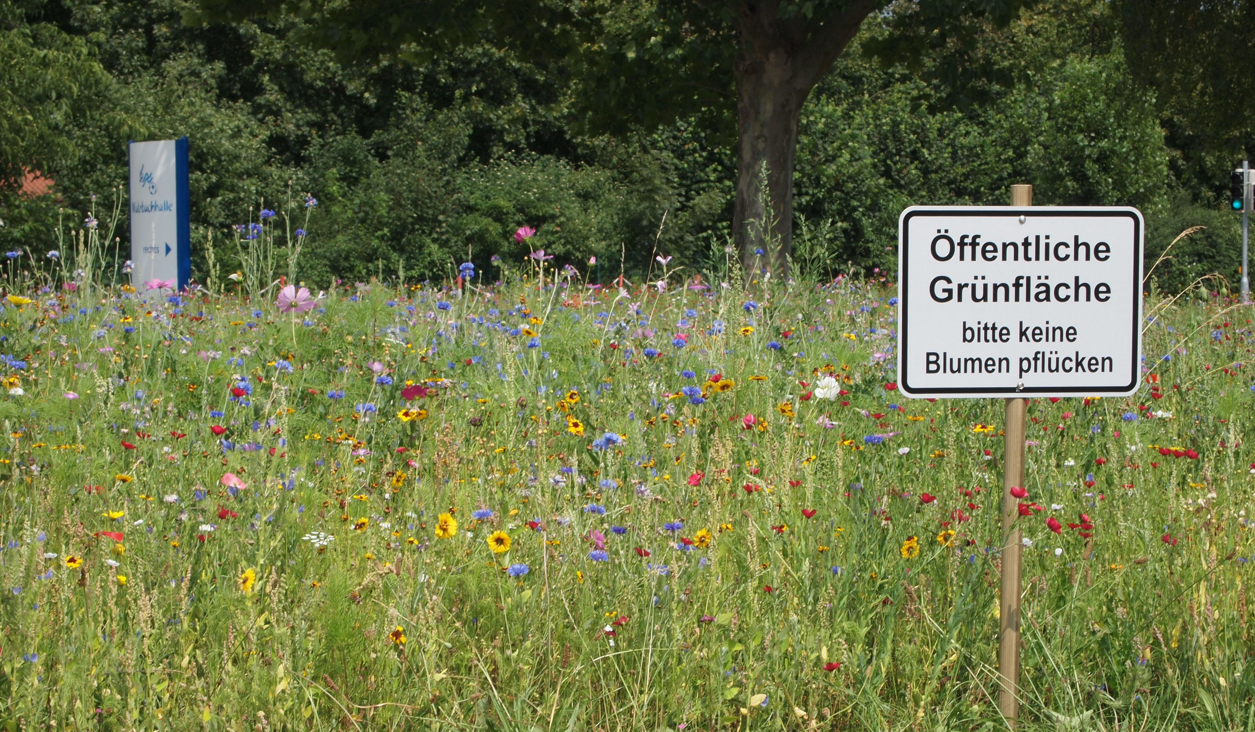 Eine Blumenwiese in Weingarten (Baden), markiert als Öffentliche Grünfläche